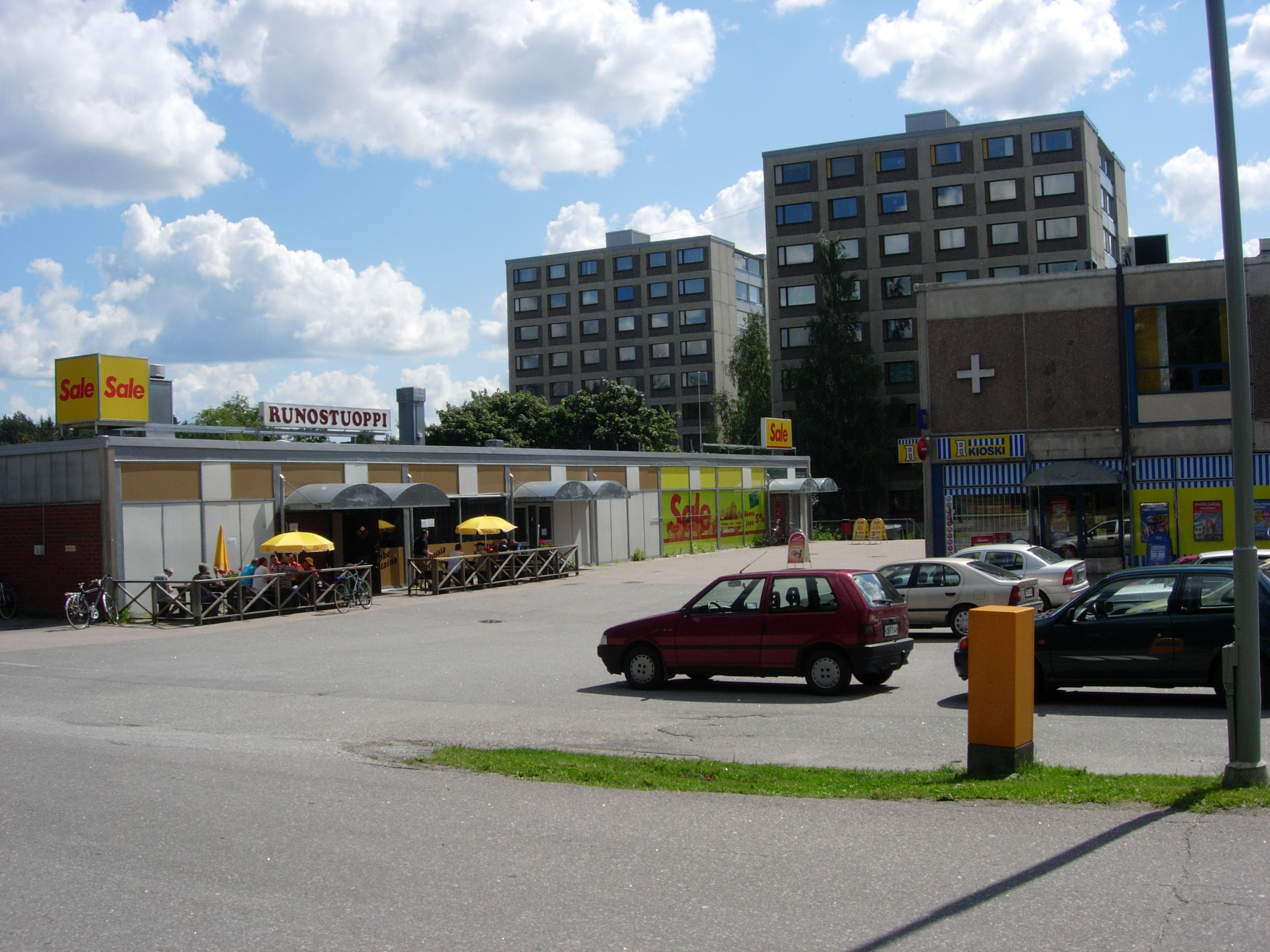 Munterinkadun Sale, Runostuoppi ja R-kioski Runosmäessä.